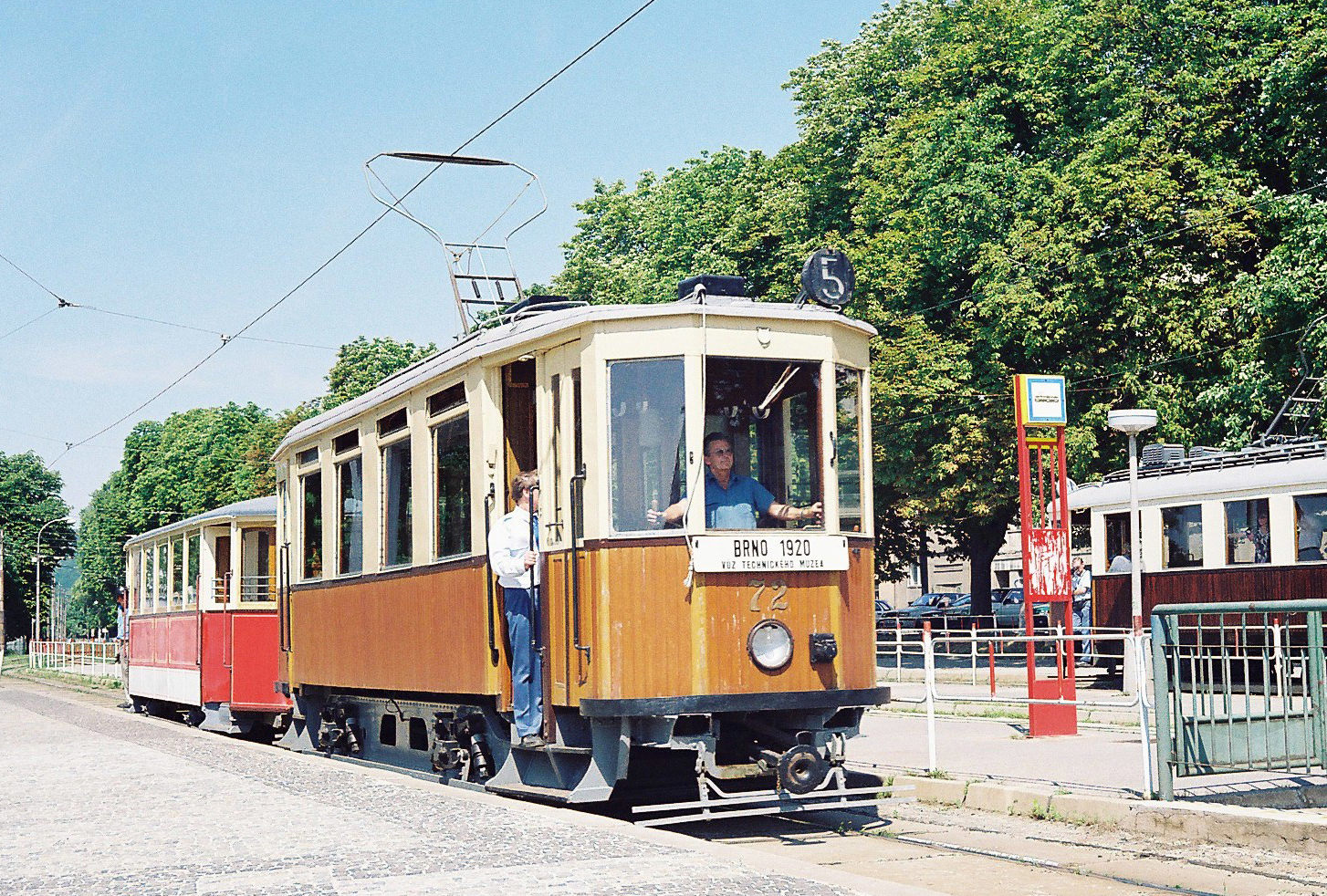 Tramvaj evidenčního čísla 72 na dopravní nostalgii v roce 2000 – archiv Jiřího Vobeckého